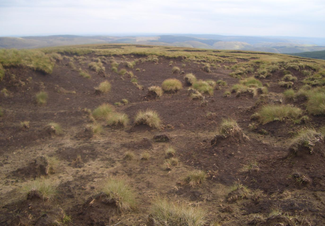 gwaun llydan peat